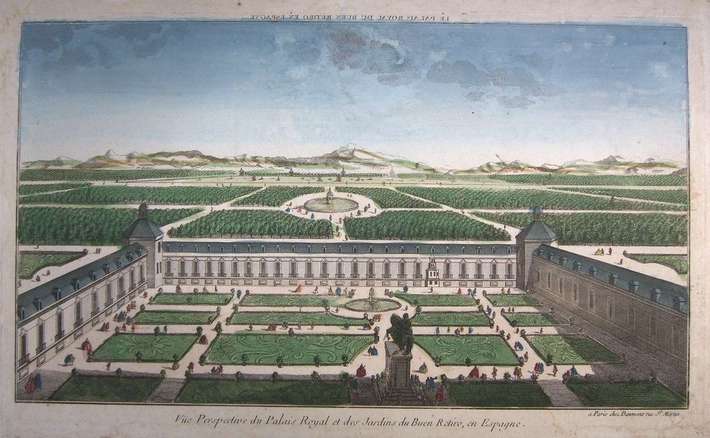 "Vue Perspective du Palais Royal et des Jardins du Buen Retiro ...". Guckkastenblatt. Kolorierter Kupferstich bei Daumont Paris, 18. Jh., Platte 26 x 42 cm